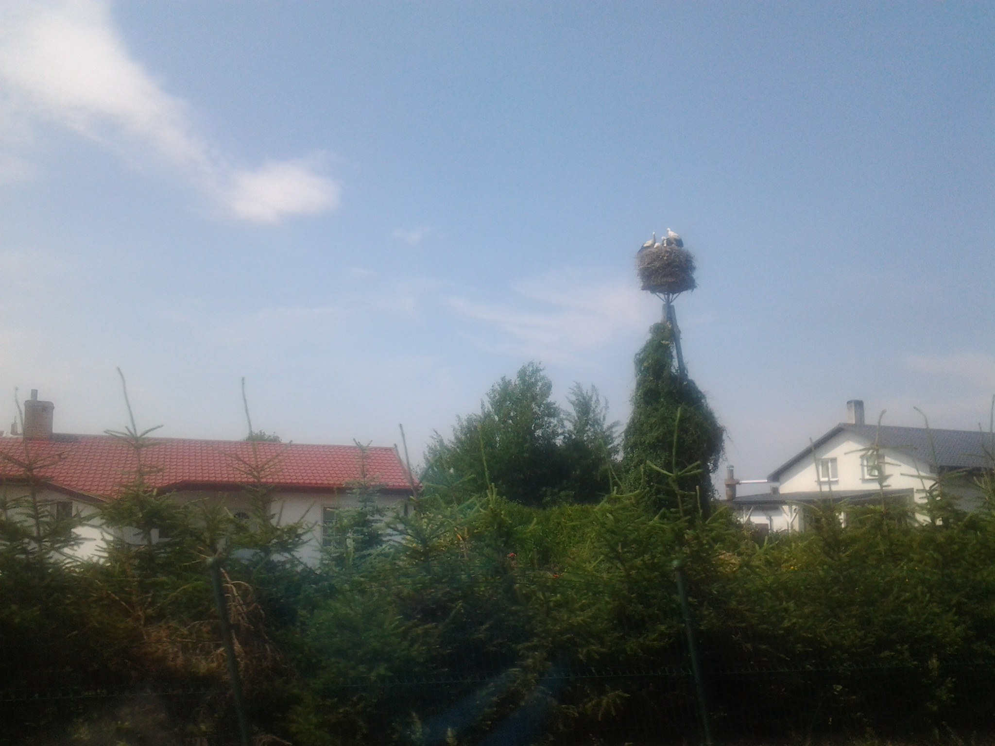 Bocianie gniazdo w Marcelinie